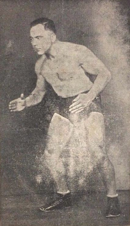 Dynamite Gus Sonnenburg en couverture du programme de catch en 1930